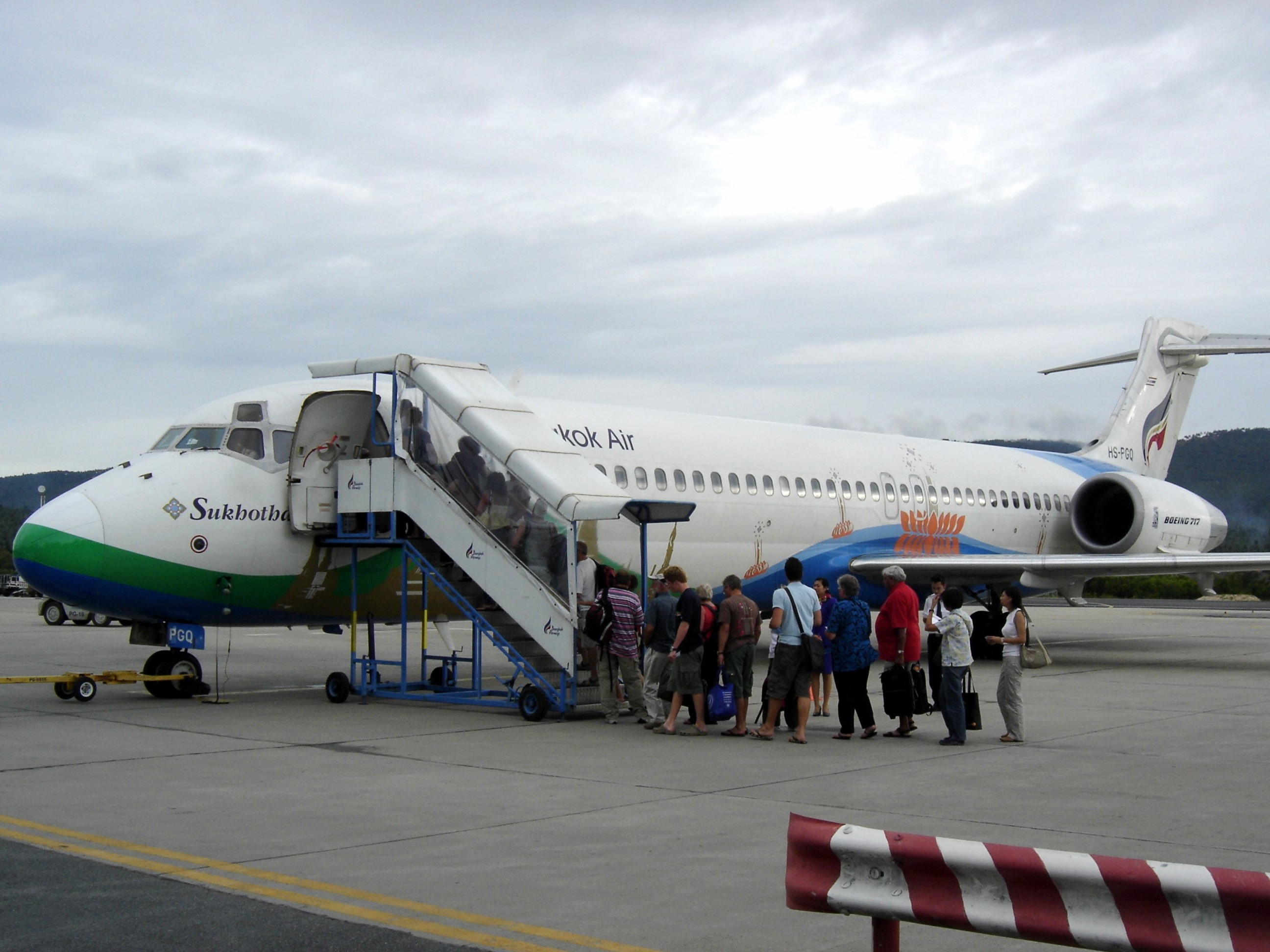 Bangkok Airways Boeing 717 at Koh Samui Airport, Thailand.